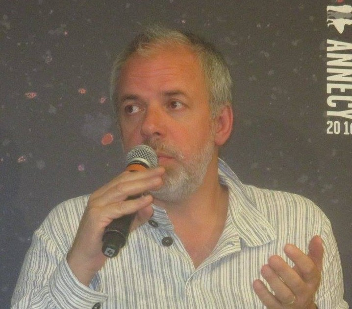 Marc du Pontavice au festival international du film d'animation d'annecy 2016